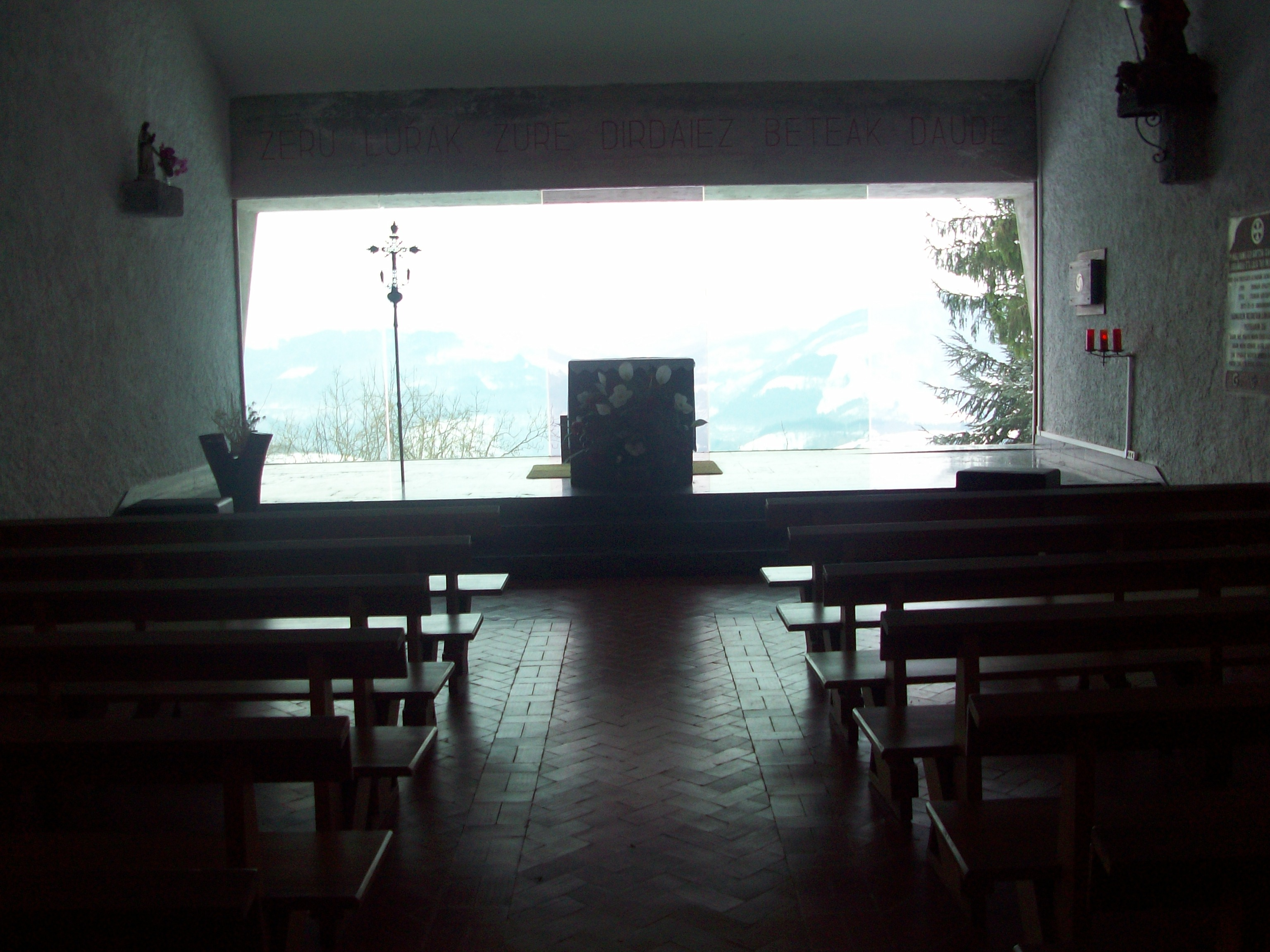 Tolosako Aldaba auzoko San Migel eliza. Gipuzkoa, Euskal Herria. San Michael´s Church of Aldaba, Tolosa. Gipuzkoa, Basque Country.